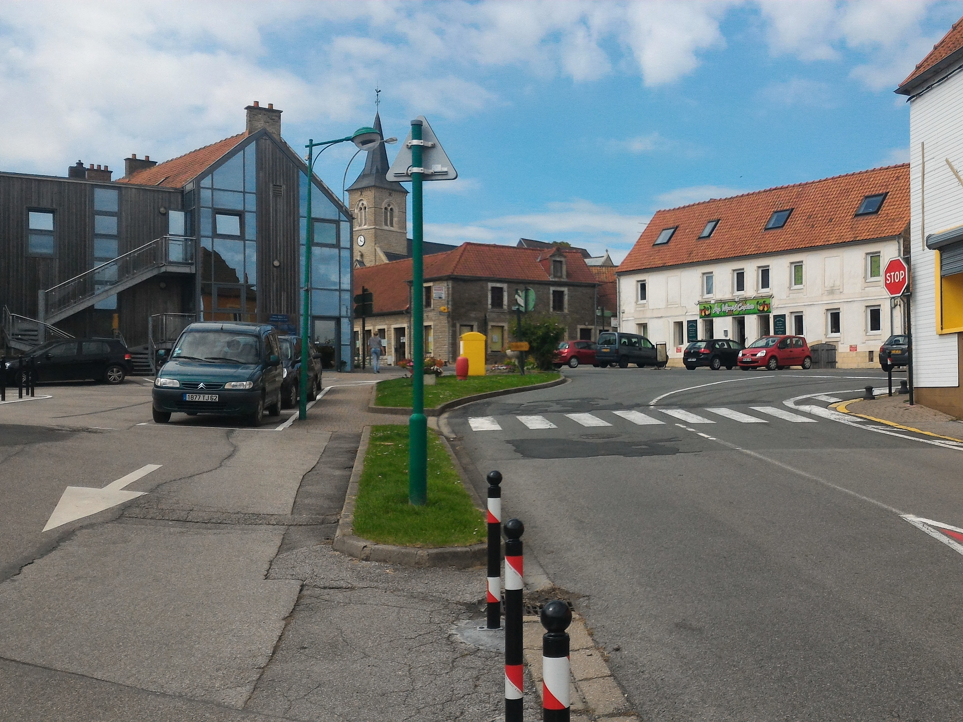 La Capelle-lès-Boulogne